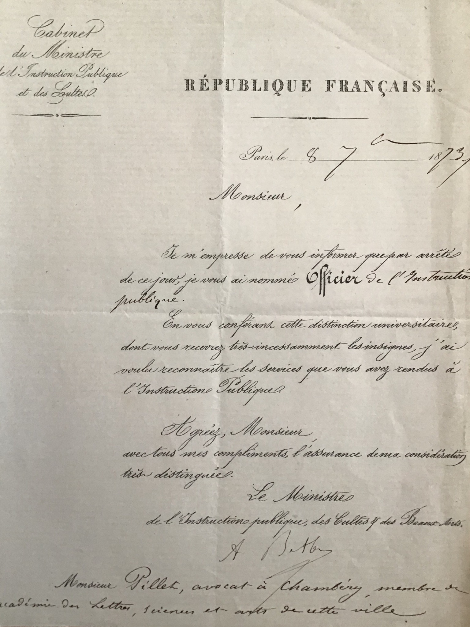 Lettre du Cabinet du Ministre de l’Instruction Publique et des Cultes nommant Louis Pillet, avocat à Chambéry et membre de l’Académie des Lettres, sciences et arts de cette ville, Officier de l’Instruction Publique.